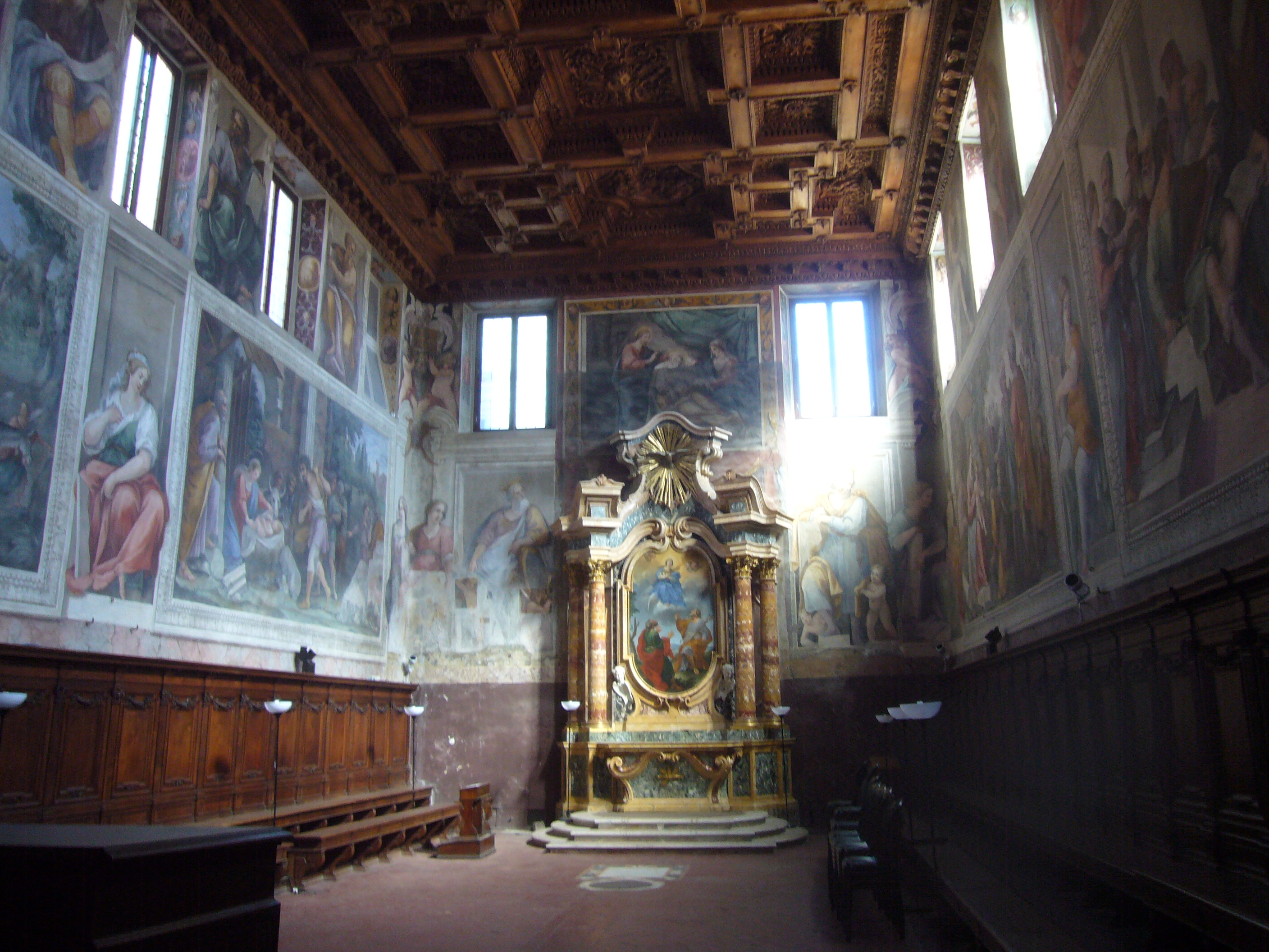 Roma, san Giuseppe dei Falegnami. Oratorio della Confraternita